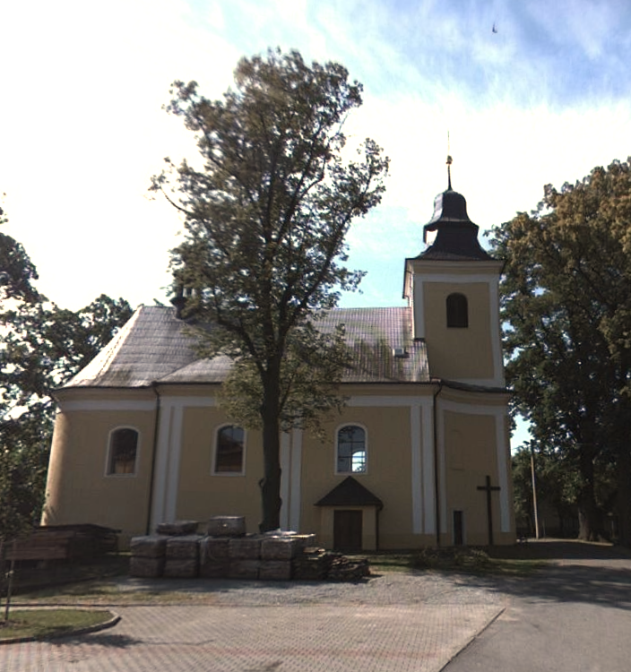 kostel Deštná